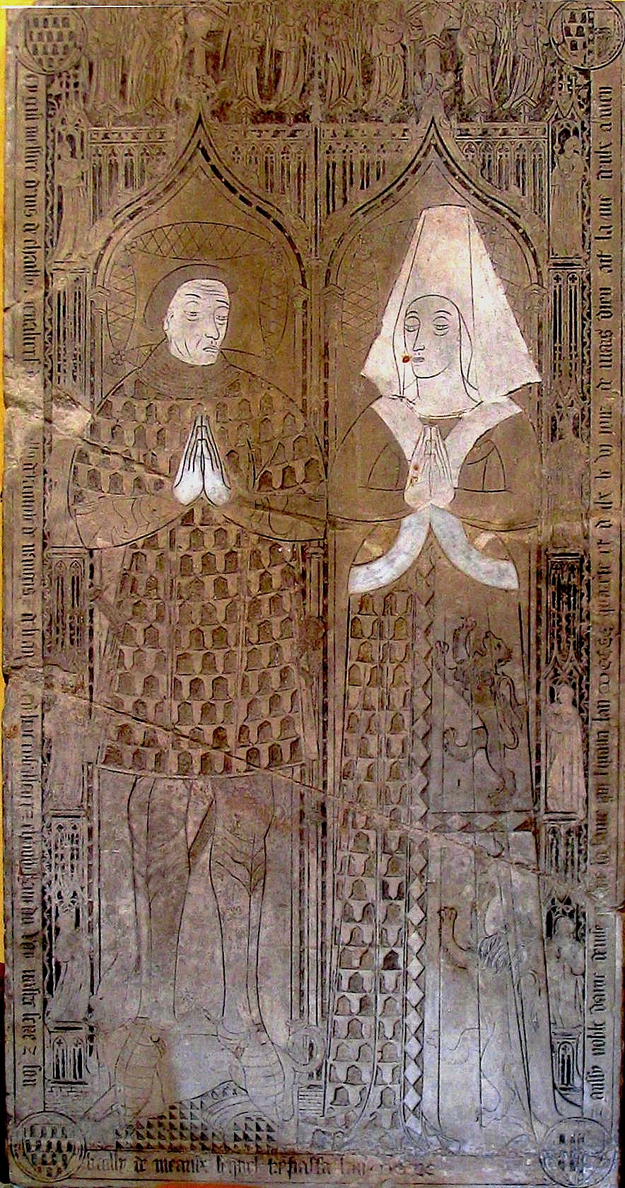 Dalle funéraire de Denis de Chailly, militaire du XIVe siècle, et de son épouse Denise Pisdoë.